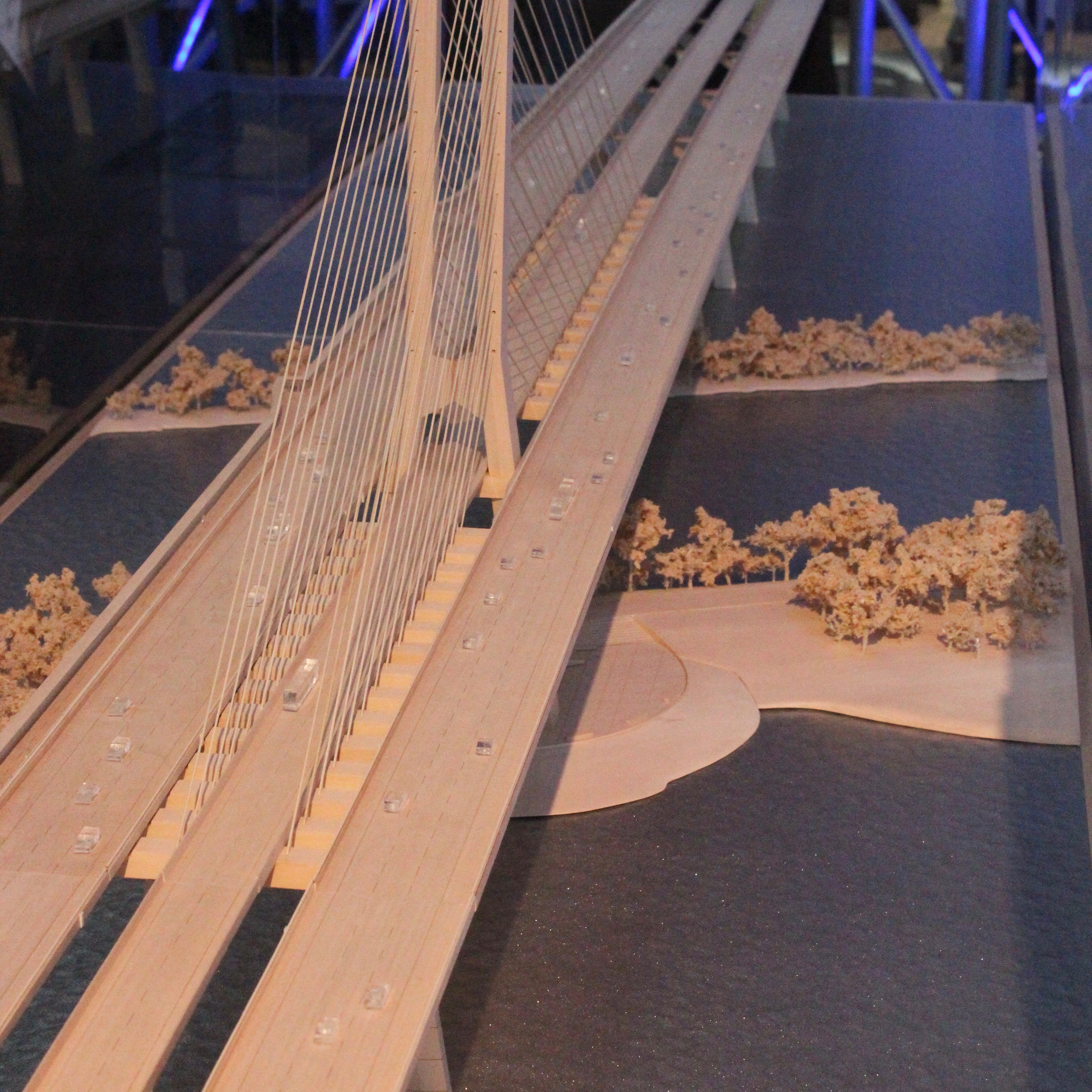 Maquette 1:275 de la section haubanée du nouveau pont Champlain.